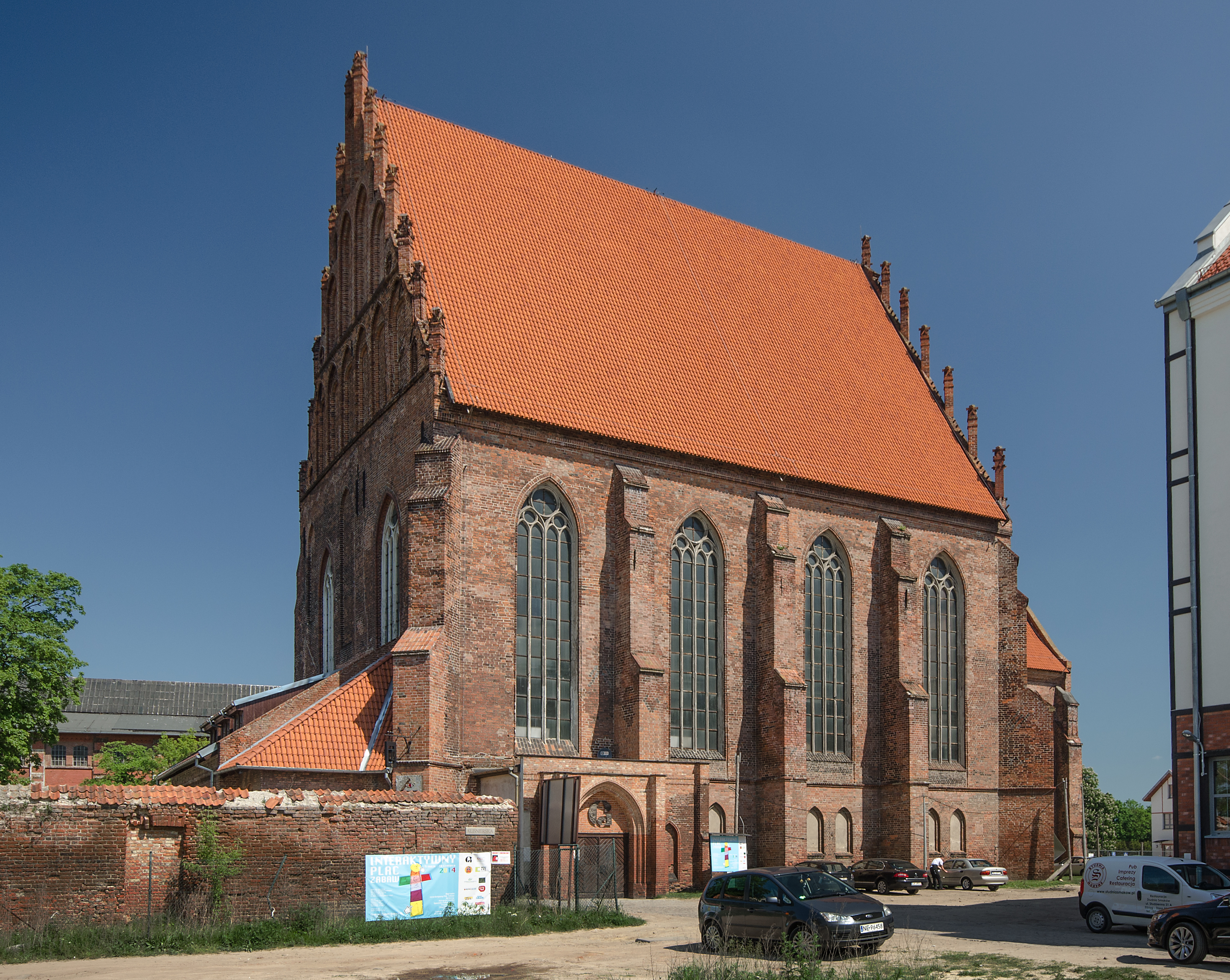 Elbląg, kościół p.w. NMP, ob. galeria sztuki EL, 2 poł. XIII, XIV, 1976-1982